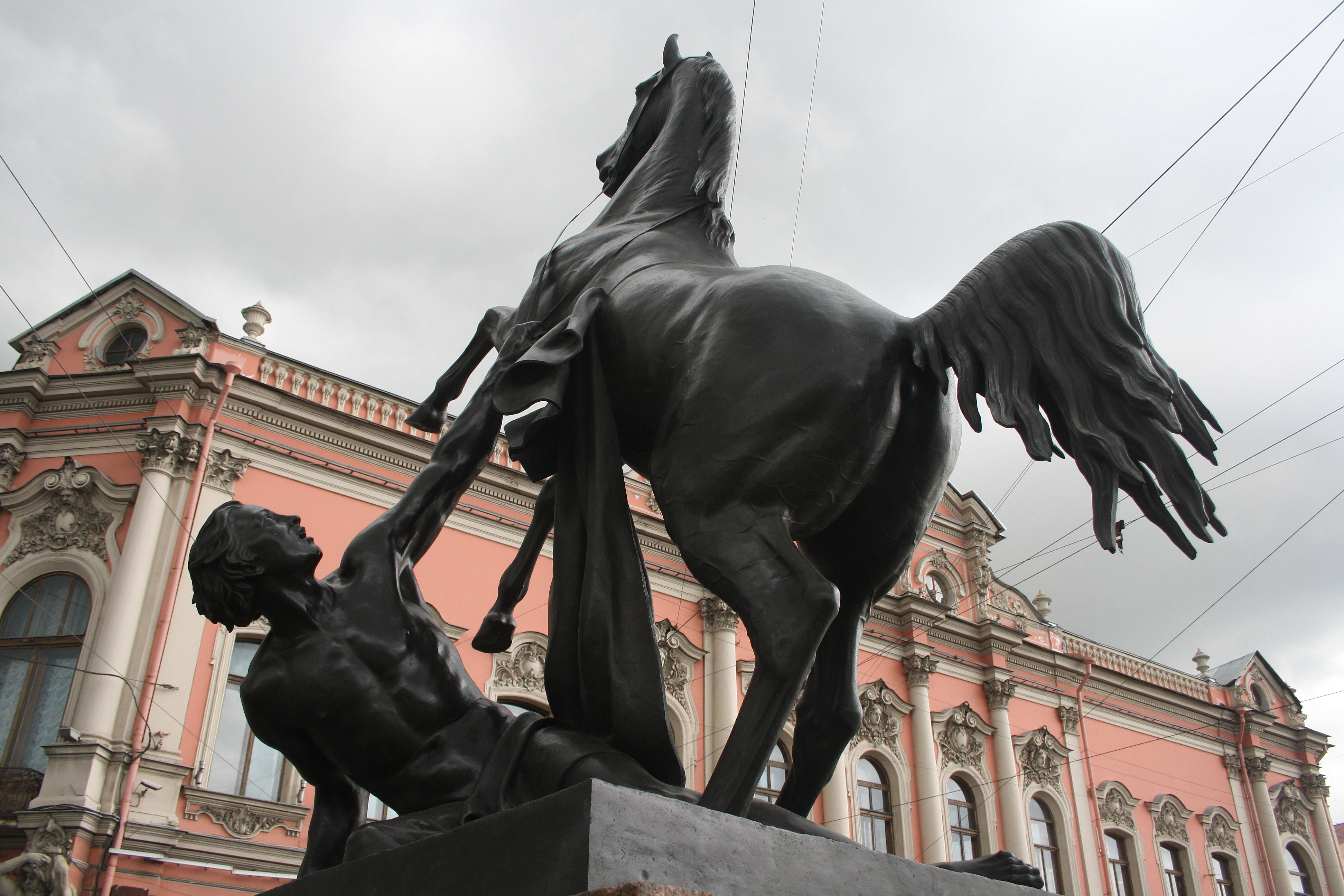 Ани́чков мост[1] — один из самых известных мостов Санкт-Петербурга. Постоянный каменный мост переброшен через Фонтанку по линии Невского проспекта в 1785 году. Одна из 4-х скульптур "Укротители коней" на мосту. Клодт.